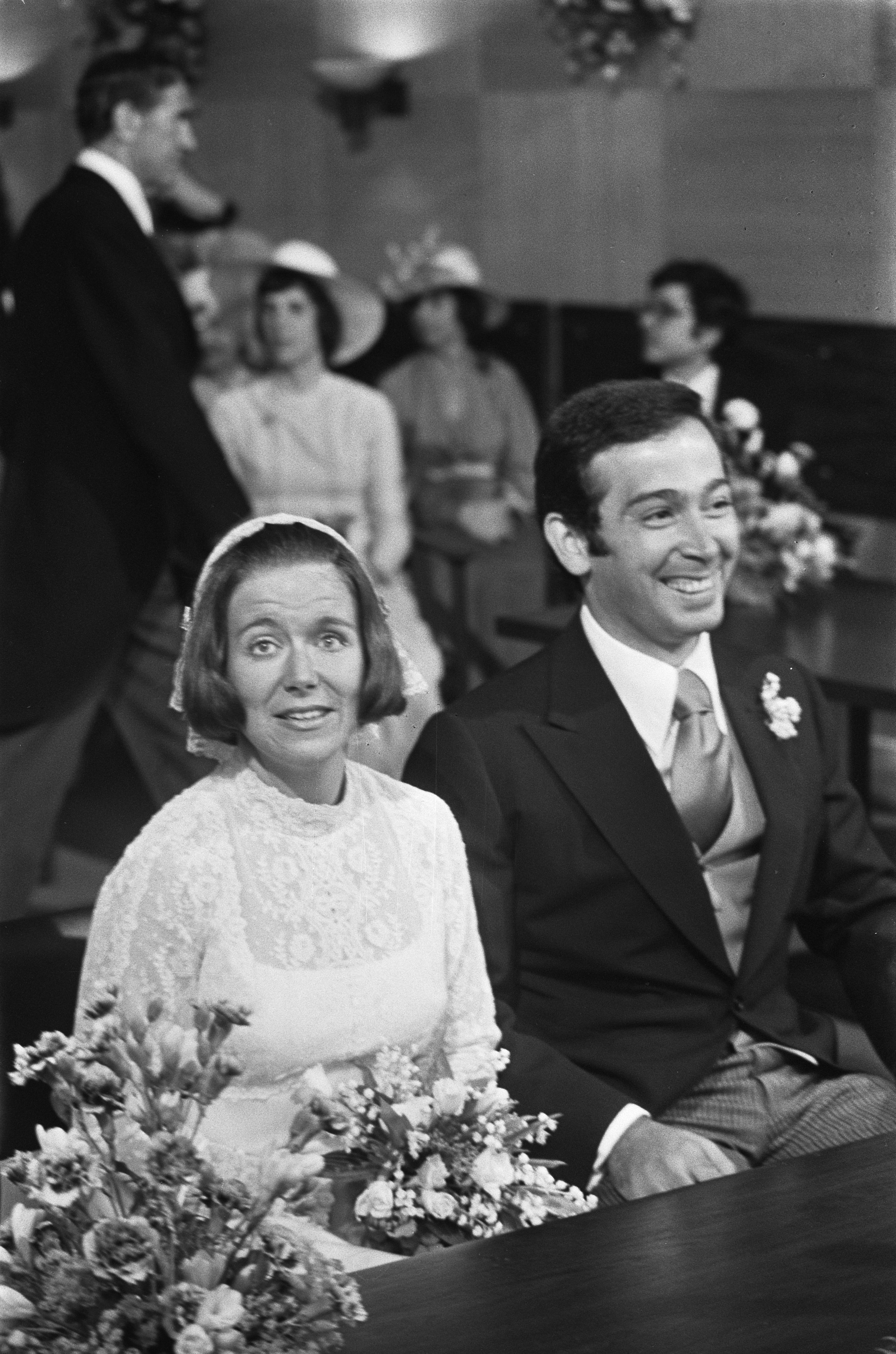 Collectie / Archief : Fotocollectie Anefo Reportage / Serie : Huwelijk prinses Christina en Jorge Guillermo; de sluiting van het burgerlijk huwelijk in het stadhuis van Baarn Beschrijving : Prinses Christina en Jorge Guillermo bij de sluiting van het burgerlijk huwelijk Datum : 28 juni 1975 Locatie : Baarn, Utrecht (prov.) Trefwoorden : huwelijken, prinsessen, stadhuizen Persoonsnaam : Christina, prinses, Guillermo, Jorge Fotograaf : Fotograaf Onbekend / Anefo, Croes, Rob C. / Anefo Auteursrechthebbende : Nationaal Archief Materiaalsoort : Negatief (zwart/wit) Nummer archiefinventaris : bekijk toegang 2.24.01.05 Bestanddeelnummer : 928-0189